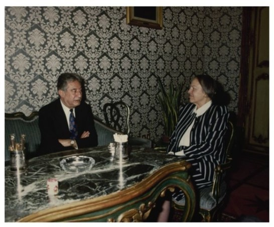 Il Presidente della Camera dei Deputati Nilde Iotti riceve l'ammiraglio Fulvio Martini